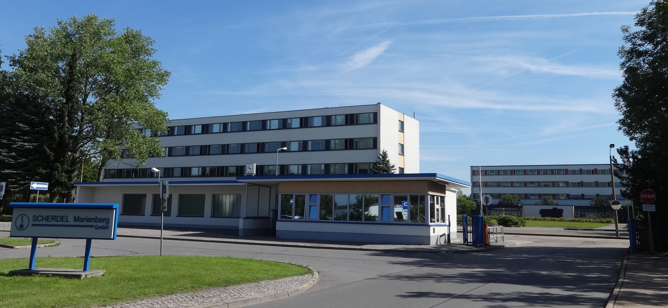 Ehemaiges Federnwerk, heute Scherdel Marienberg GmbH